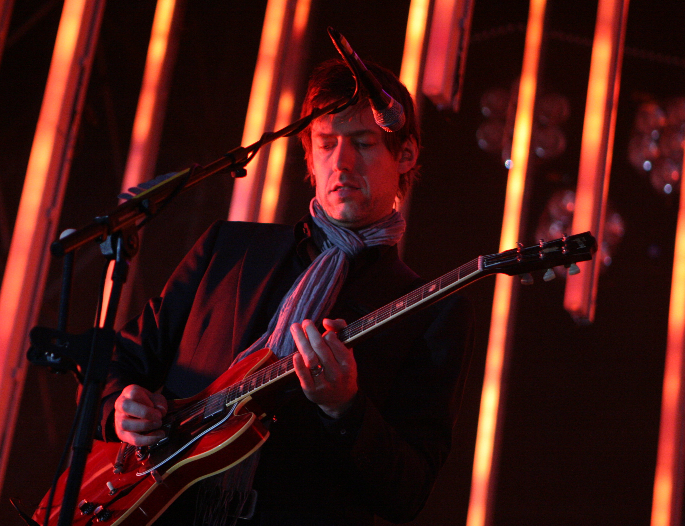 Radiohead en el Daydream Festival que se celebró en Barcelona el 12 de junio de 2008.